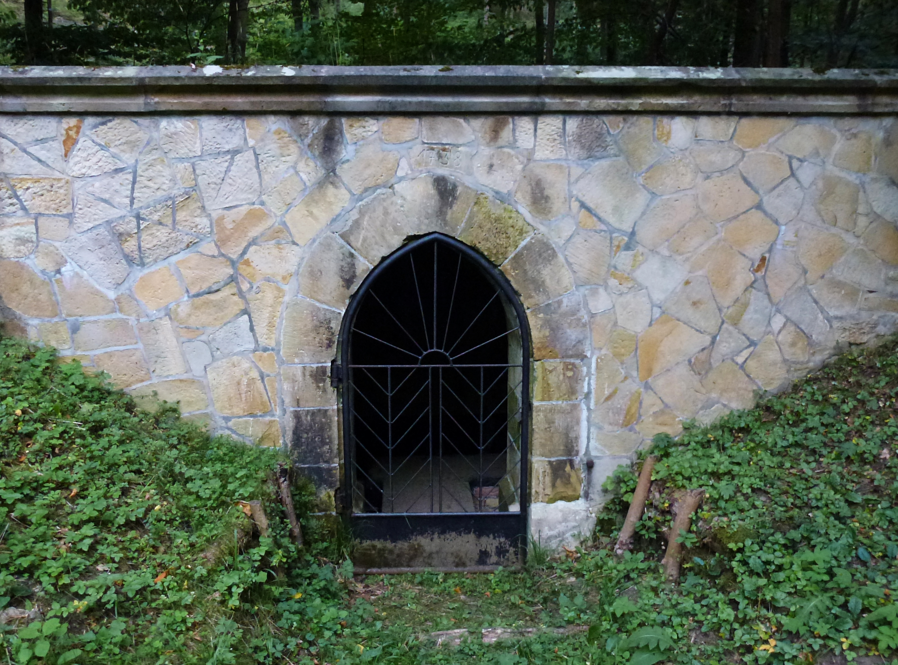 Schlosswasserhäuschen, Zwischenstation der Wasserversorgung des Schlosses Wernigerode. Das Wasser vom Grubengewässer des Eierberges wurde mit der Schlosswasserreise über diese Zwischenstation zum Schloss geleitet. (Wasserreise = frühzeitliche Wasserleitung, damals aus Holzrohren bestehend) Die Wasserleitung vom Eierberg zum Schloss war 11500 Meter lang und wurde 1730 fertiggestellt. Die Wasserleitung, die später aus Tonröhren bestand, verlief über den Annaweg und Kaiserweg zum Schloss und hatte ein Gefälle von 28 Metern.